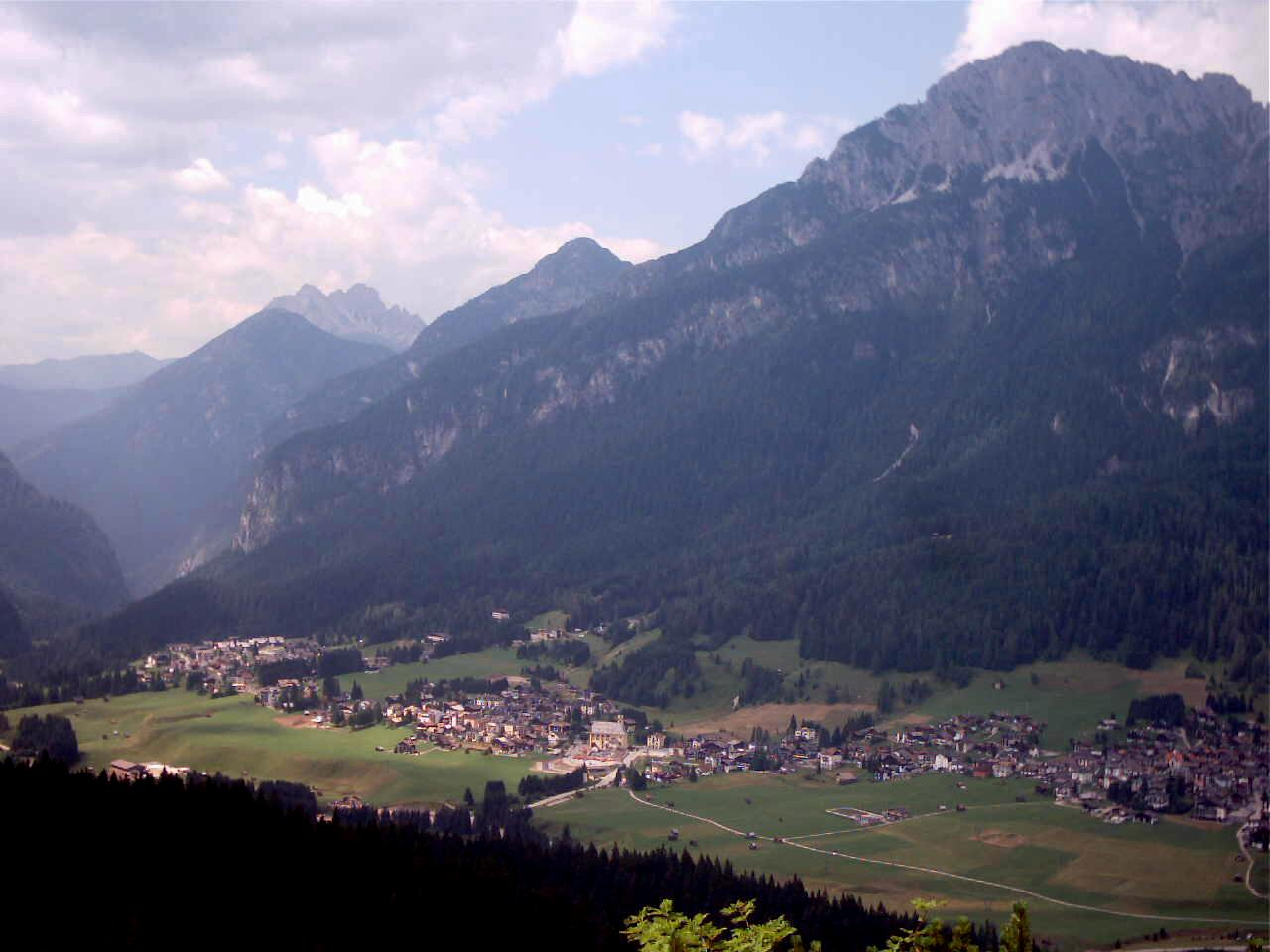 Veduta di Sappada dall'alto